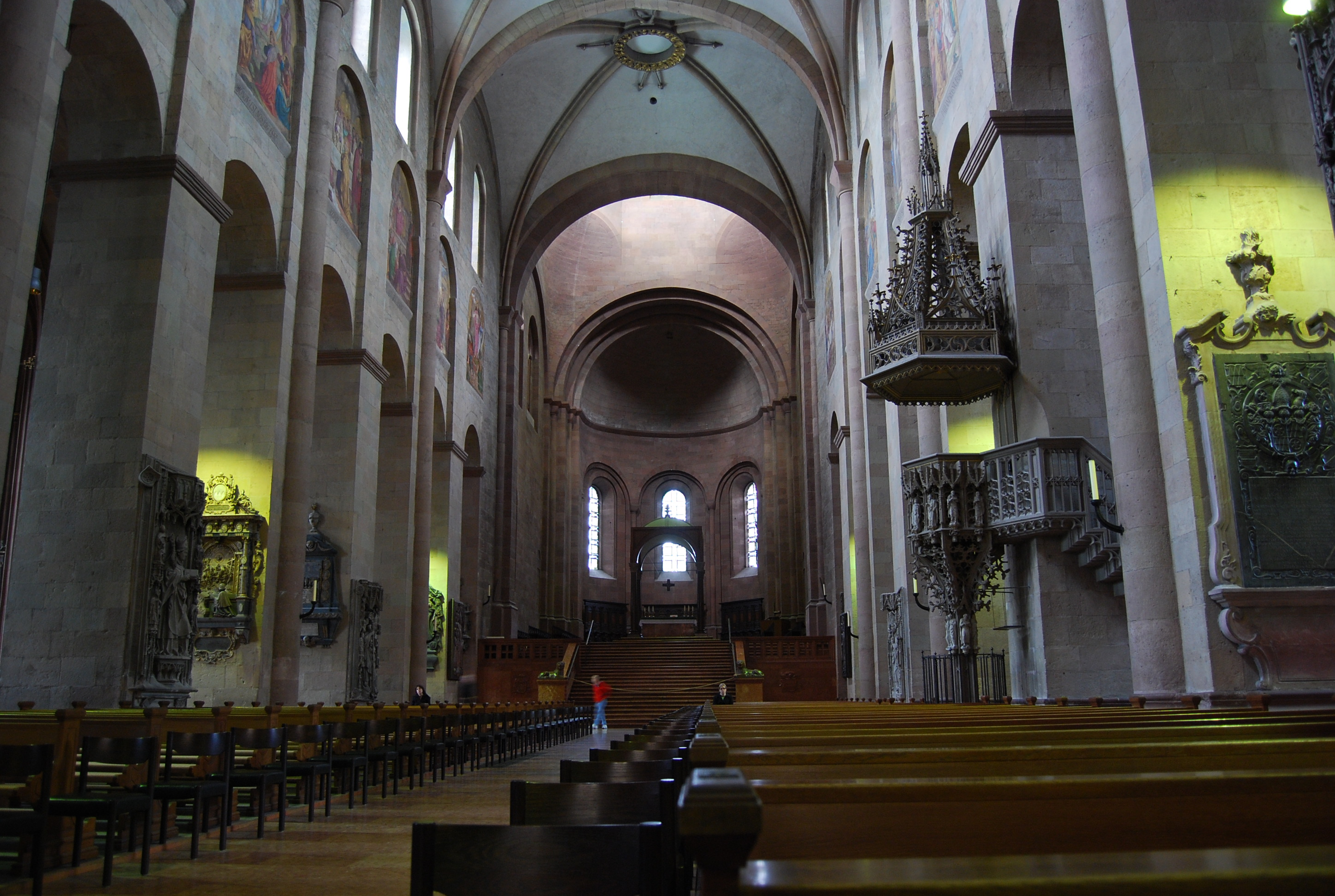 Ostchor des Mainzer Doms